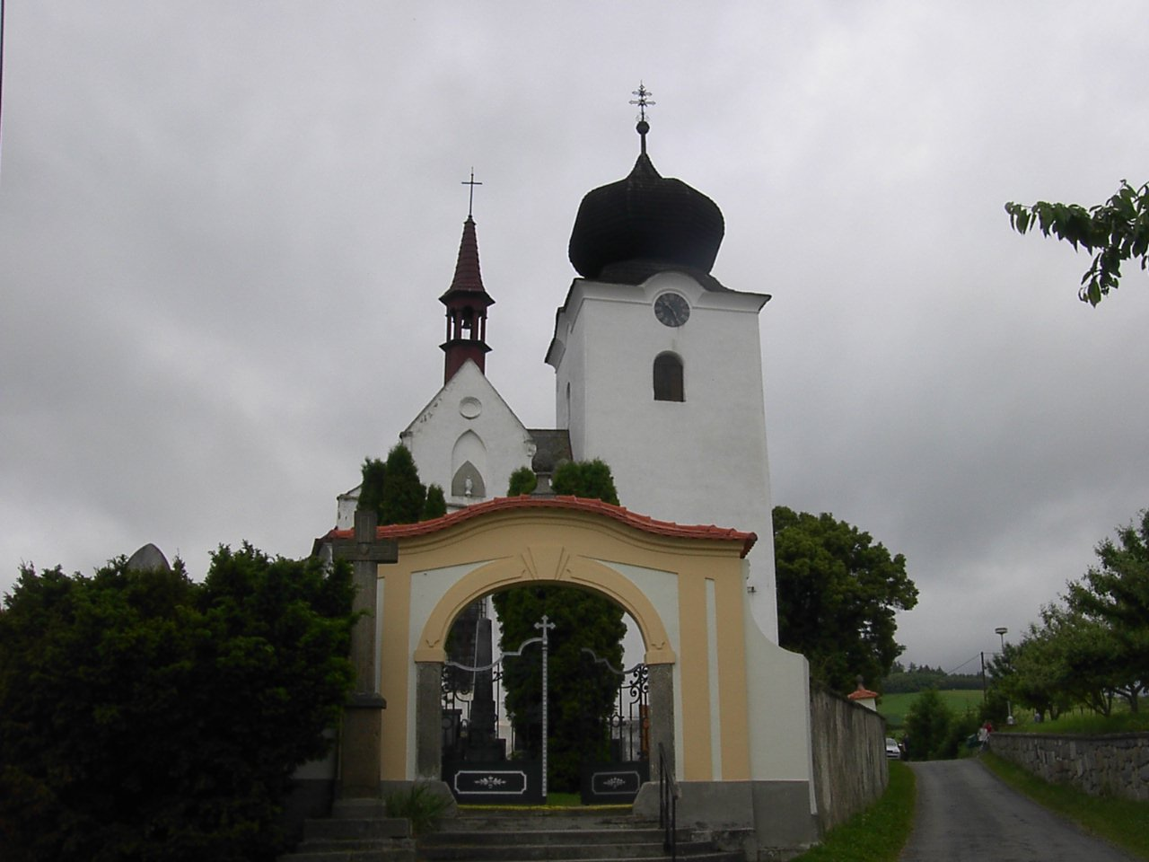 kostel v Počepicích (PB).